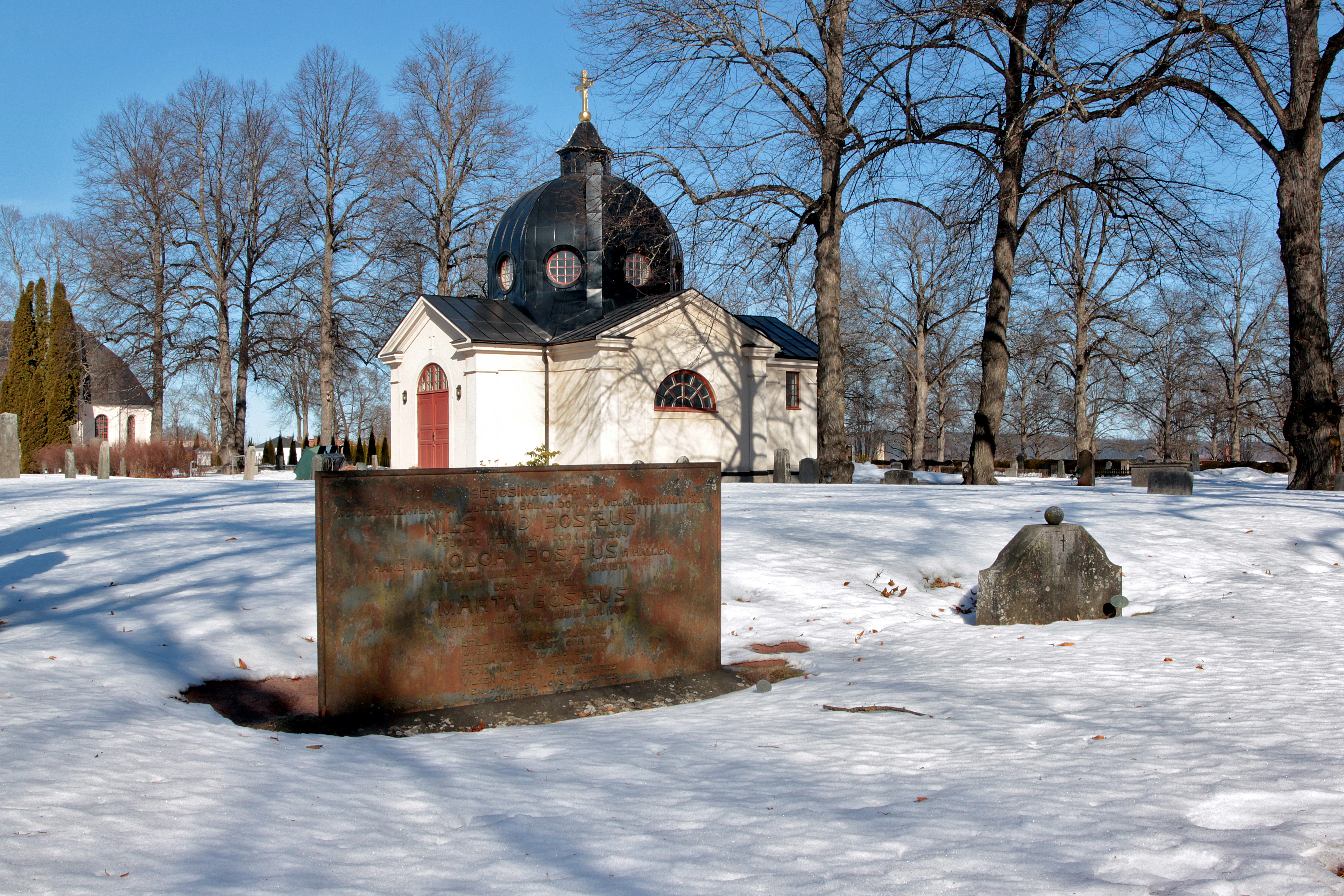 Nils Bosæus grav på Hedemora kyrkogård. I bakgrunden Hedemora kapell (f.d. Hedemora gravkapell).